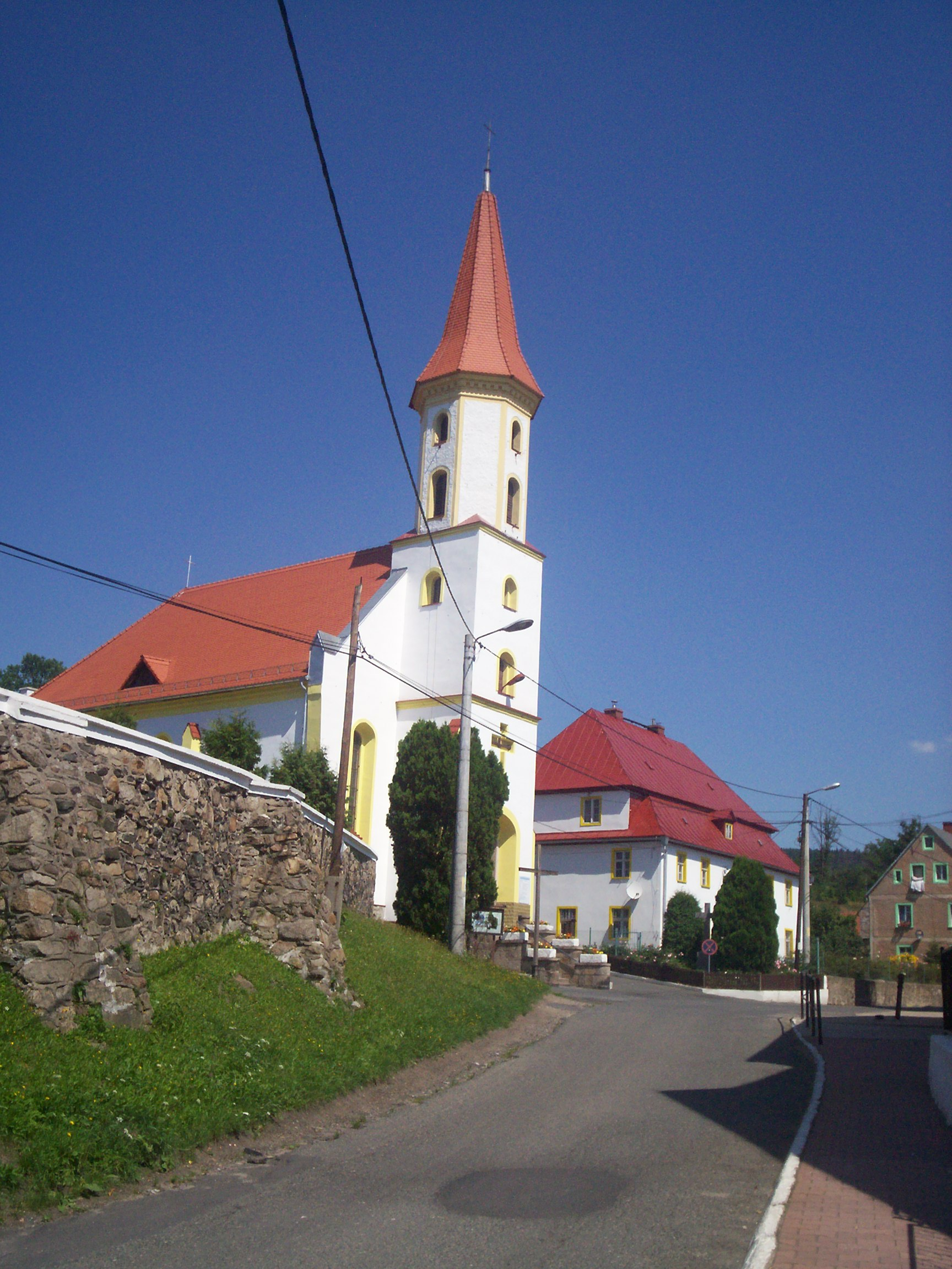 Janowice Wielkie, kościół pw. Chrystusa Króla.